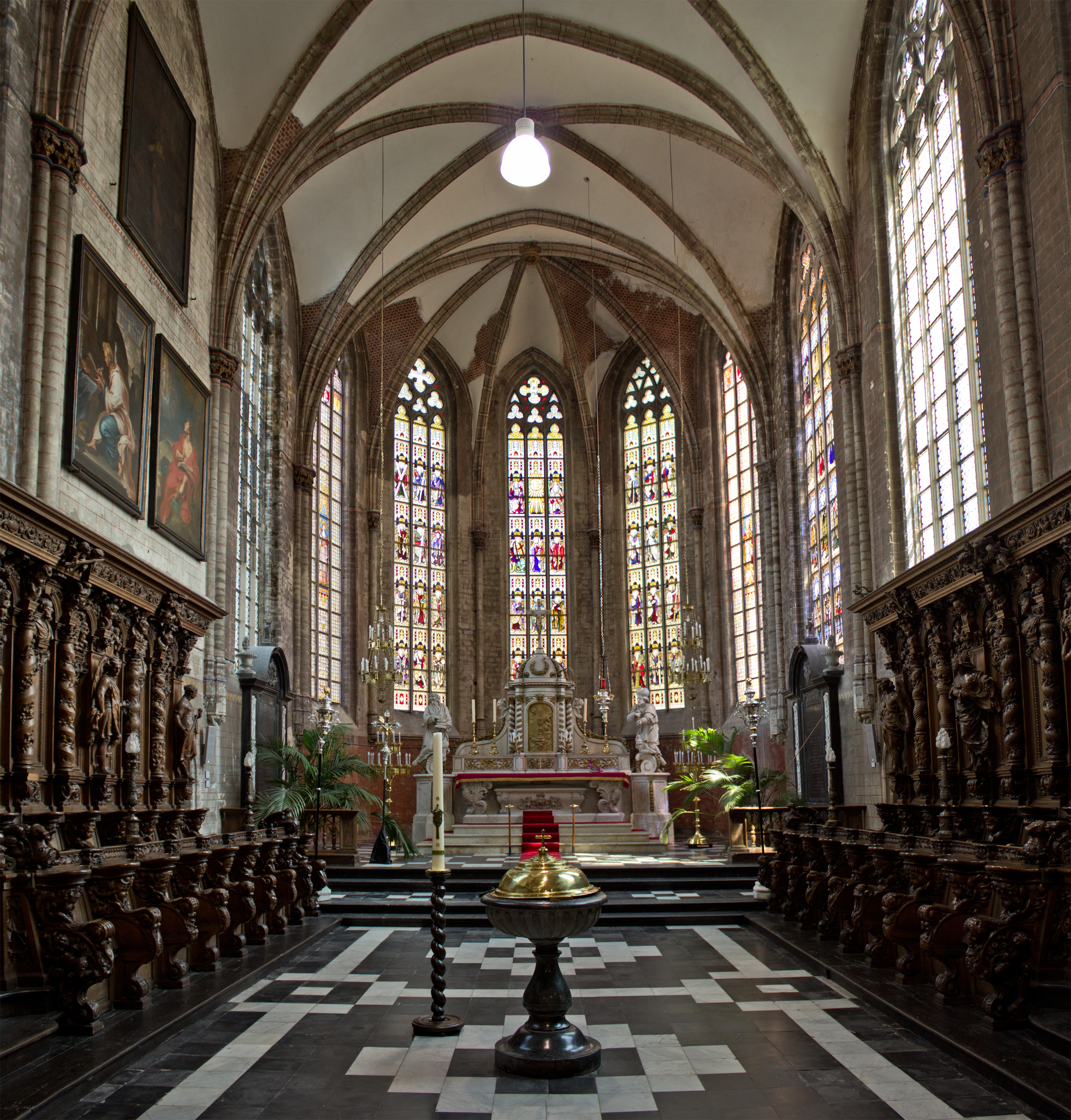 Dekanale kerk Onze-Lieve-Vrouw van Goede Hoop, Vilvoorde.